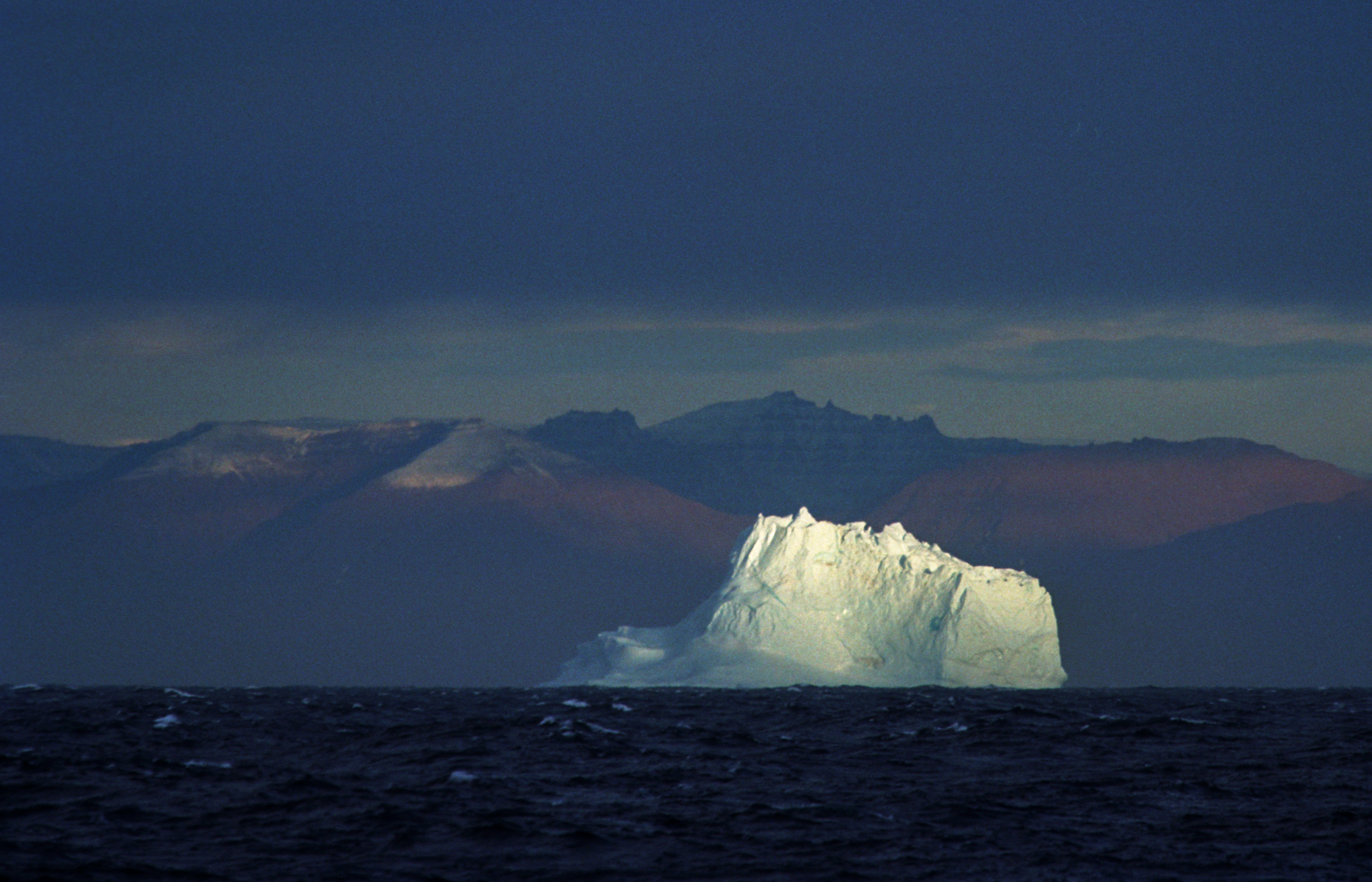 Greenland Sea, Iceberg